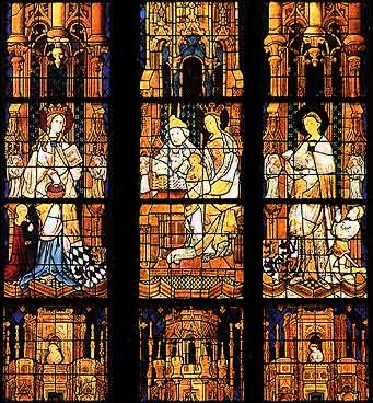 Westfenster des Altenberger Domes (ursprünglich um 1390, Erneuerungen im 19. und 20. Jahrhundert), links: Hl. Elisabeth mit Stifterbild Anna von Pfalz-Bayern (untere Teil aus einer anderen Figur ergänzt) , Mitte: Heilige Familie aus dem Kontext Anbetung der Hl. Drei Könige, rechts: Maria der Verkündigung mit Stifterbild Wilhelm I. von Jülich-Berg (siehe Uwe Gast, Daniel Parello, Hartmut Scholz: Der Altenberger Dom (Monumente der Glasmalerei 2), Schnell & Steiner, Regensburg 2008, S. 51ff, ISBN 978-3-7954-1960-8)